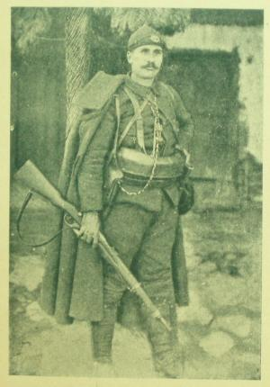 Христо Андонов.